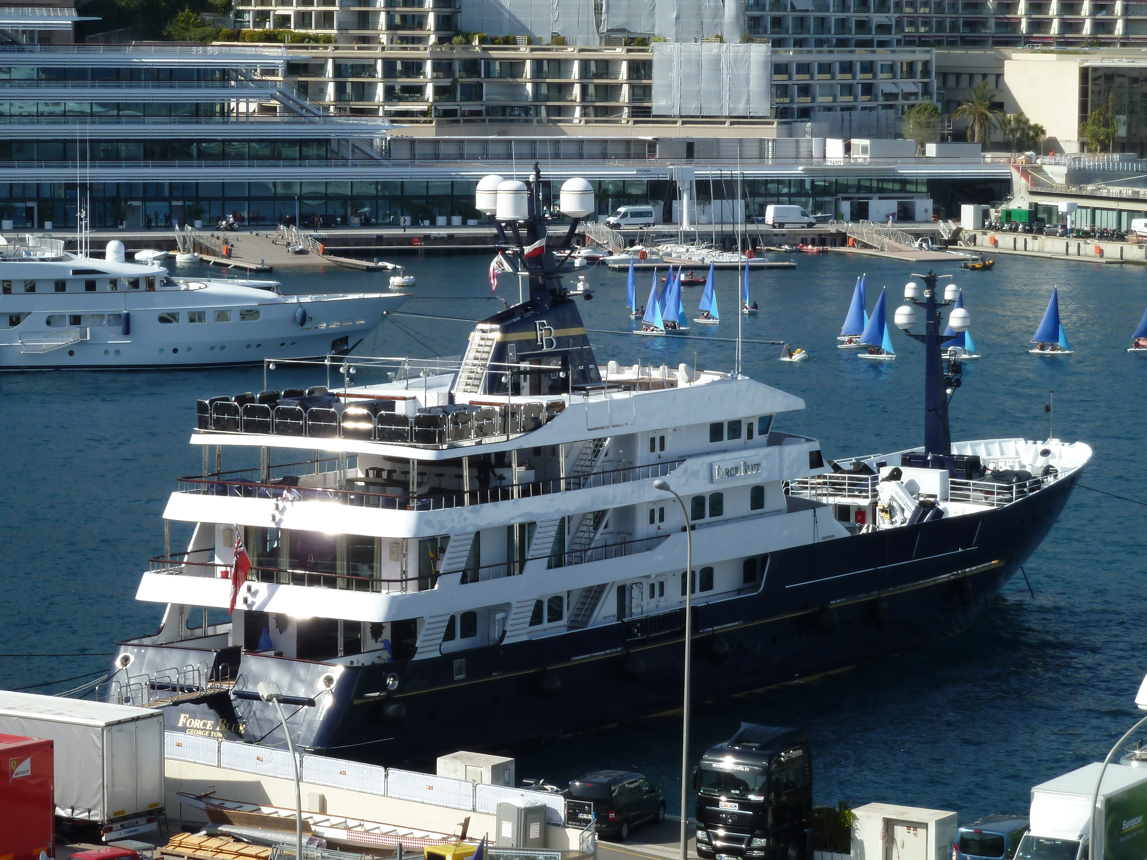 Force Blue à Monaco